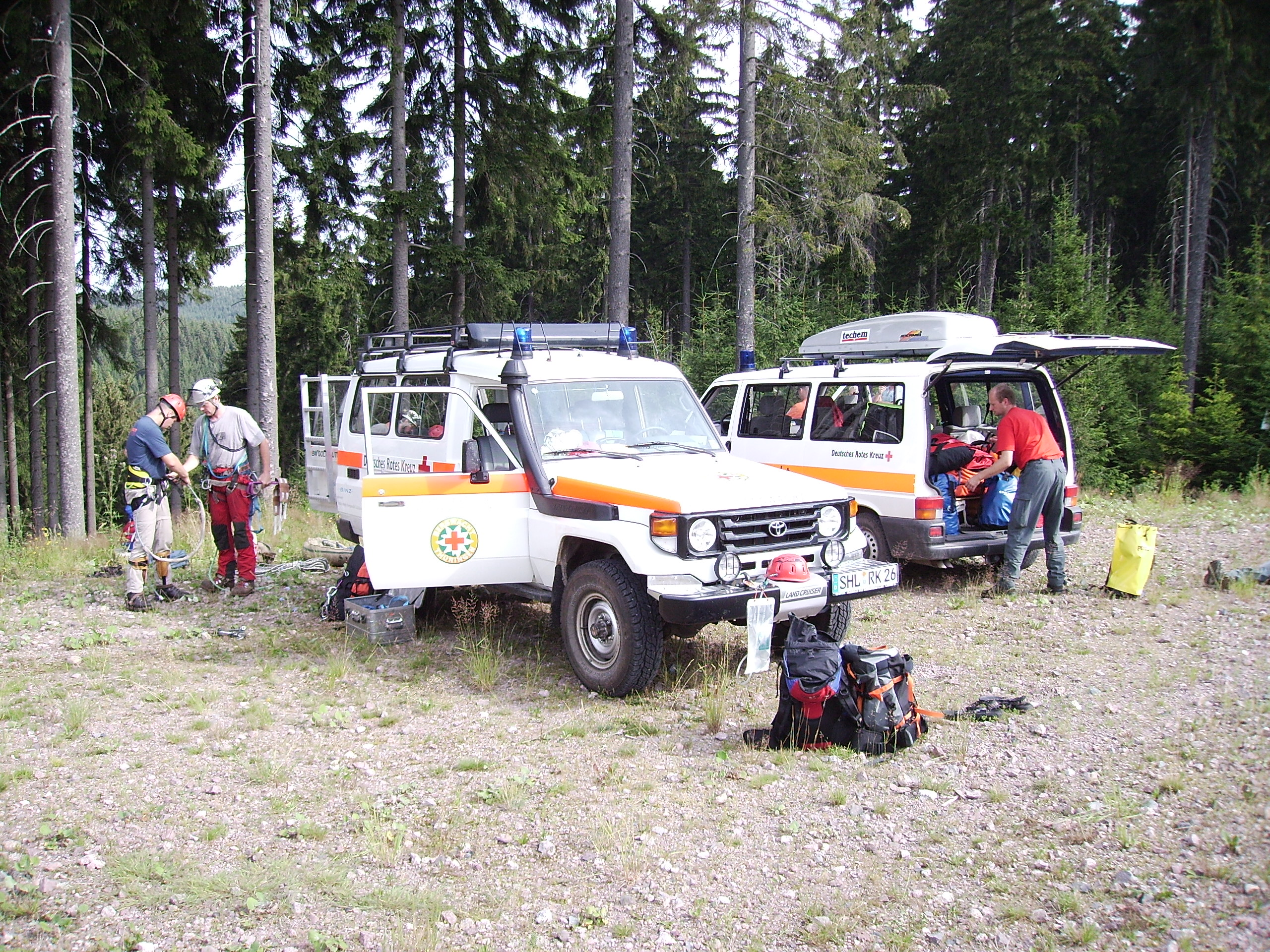 Einsatzfahrzeuge der Bergwacht Thüringen - Toyota Landcruiser (Bergwacht Goldlauter), VW-Bus rescue vehicles of German Mountain Rescue (Thuringia) - Toyota Landcruiser (Mountain Rescue Goldlauter), VW-Bus